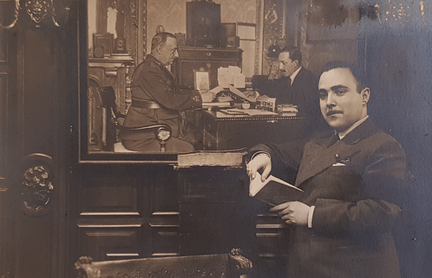 Edmundo Aragonés Merodio con 25 años. Foto de su libro "Al resurgir España".